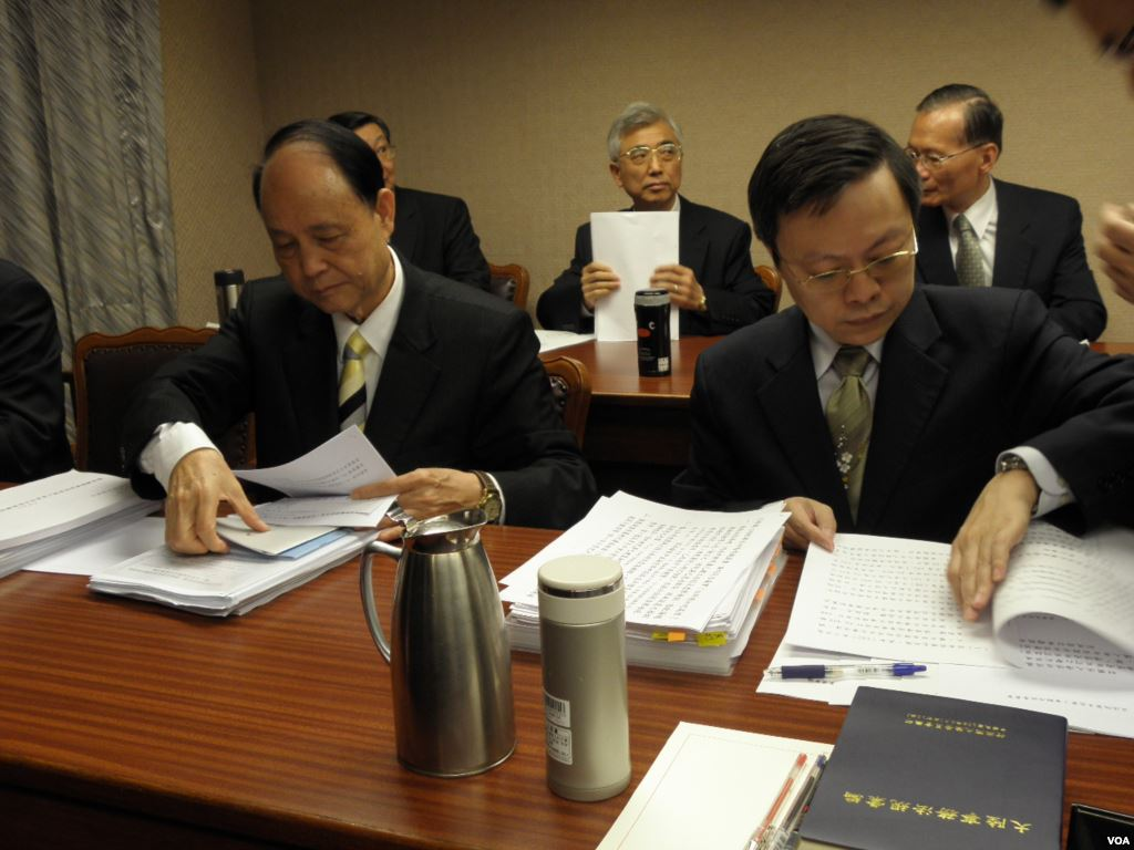 陸委會主委王郁琦和海基會董事長林中森準備答詢。